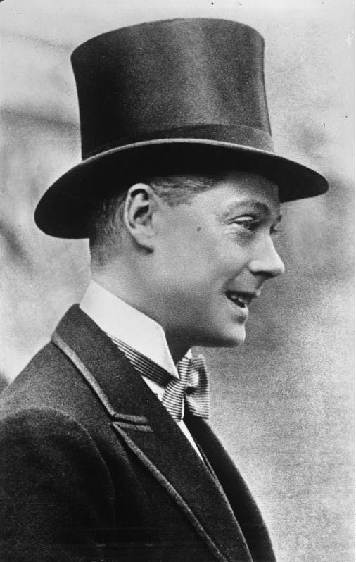 Der Prinz of Wales als Baby und als Gent ! Der Prinz of Wales als Modeprinz, wie er sich oft auf grossen Veranstaltungen zeigt.